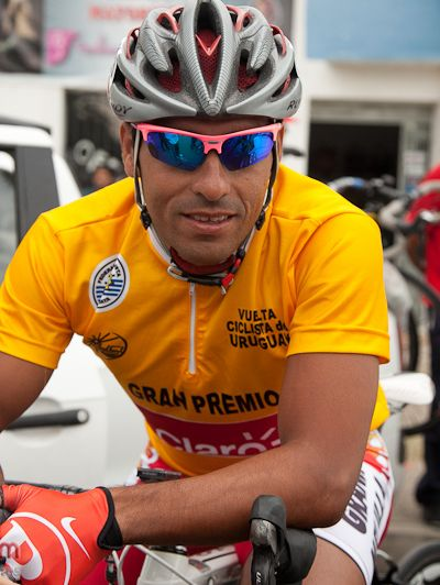 Darío Díaz, ciclista argentino durante la Vuelta Ciclista del Uruguay 2012